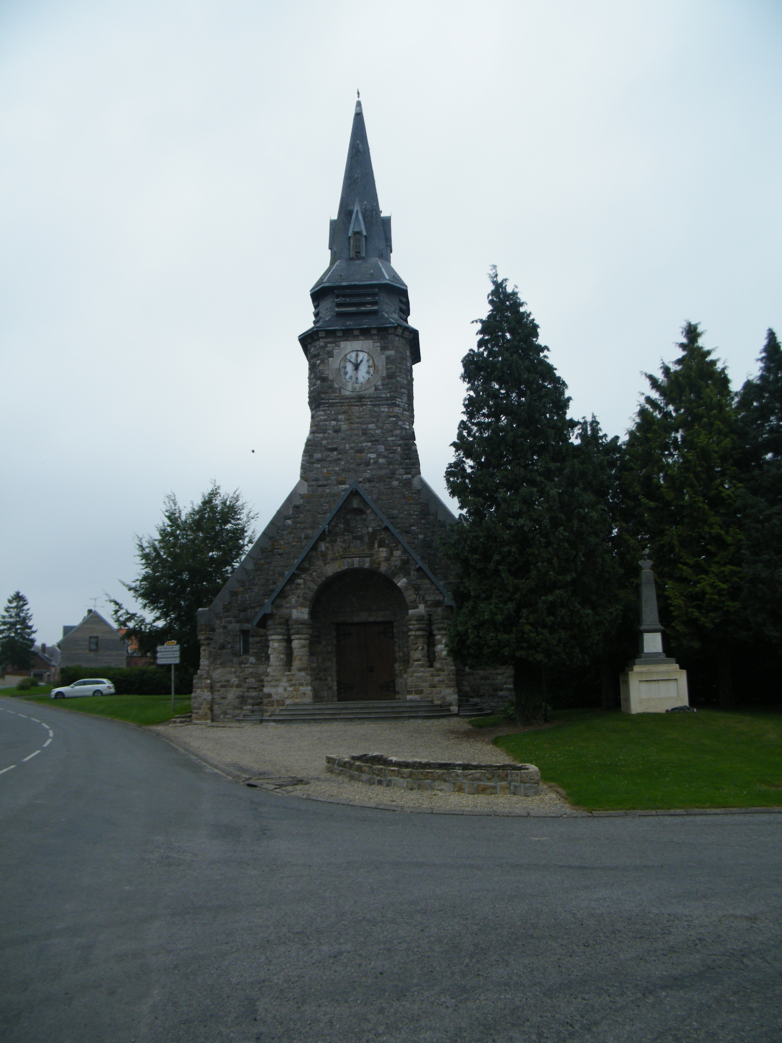 Eglise.